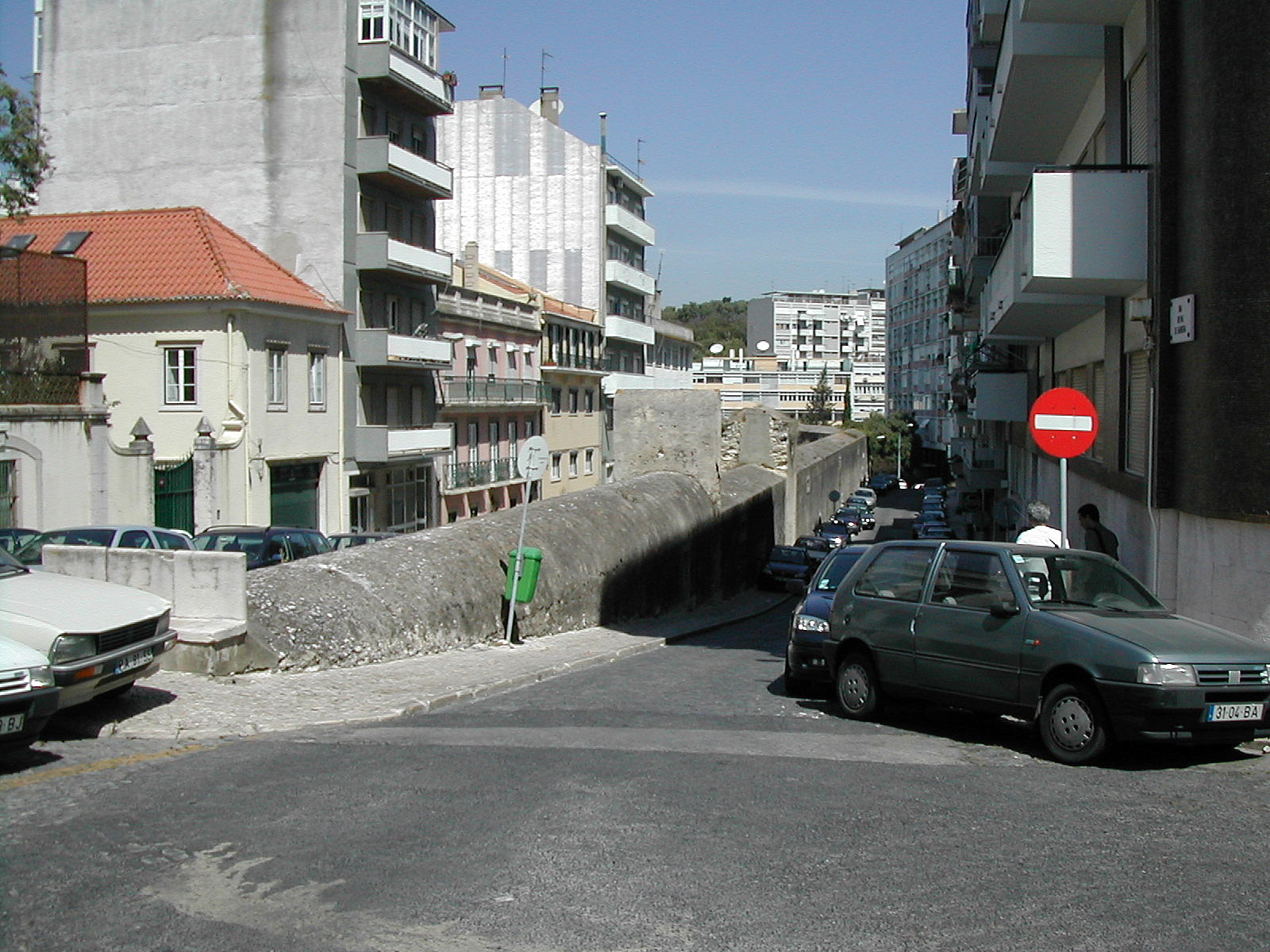 Galeria das Necessidades, Rua do Pau da Bandeira, Lisboa, Portugal